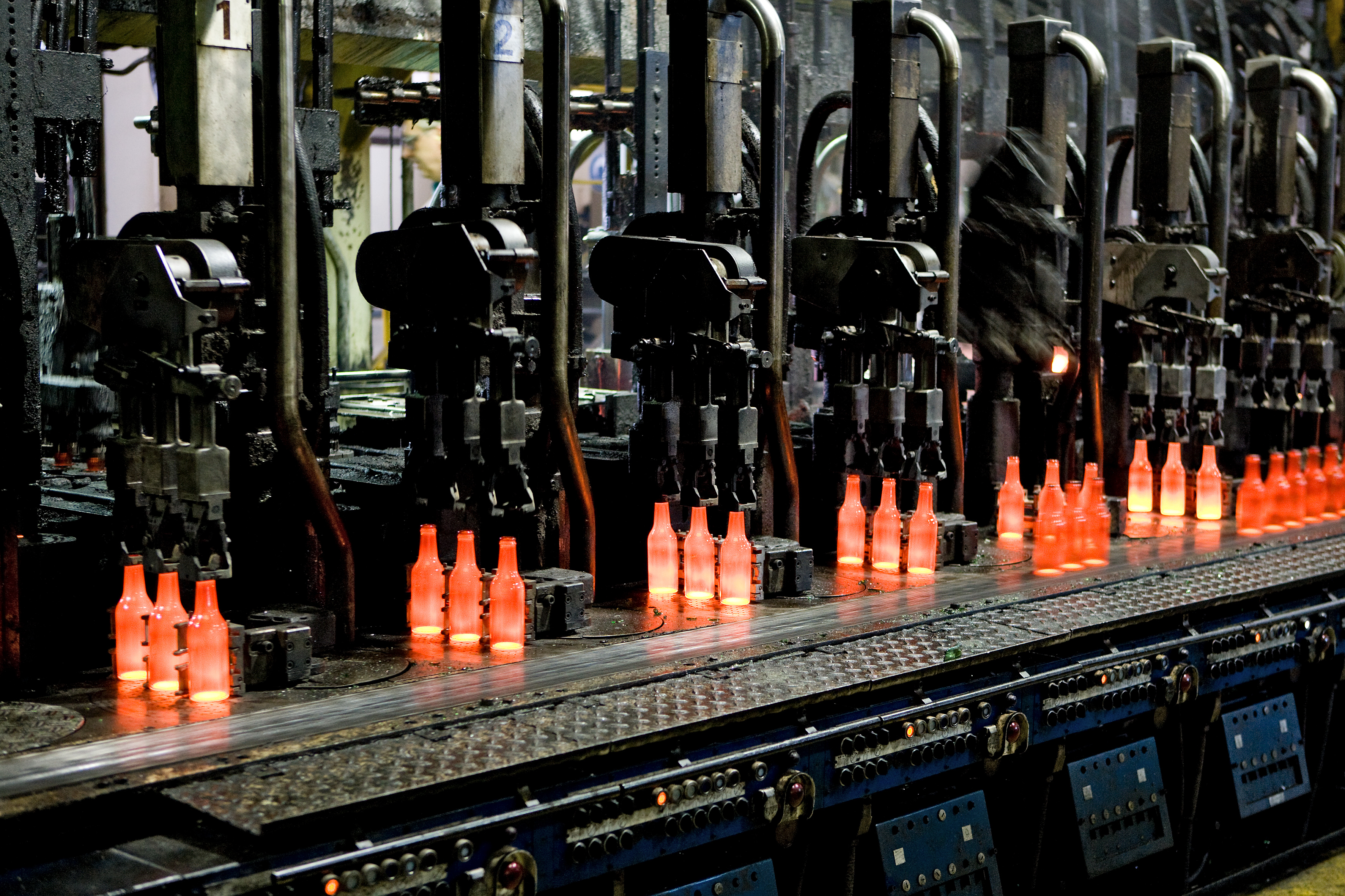 Foto maschineller Behälterglasproduktion